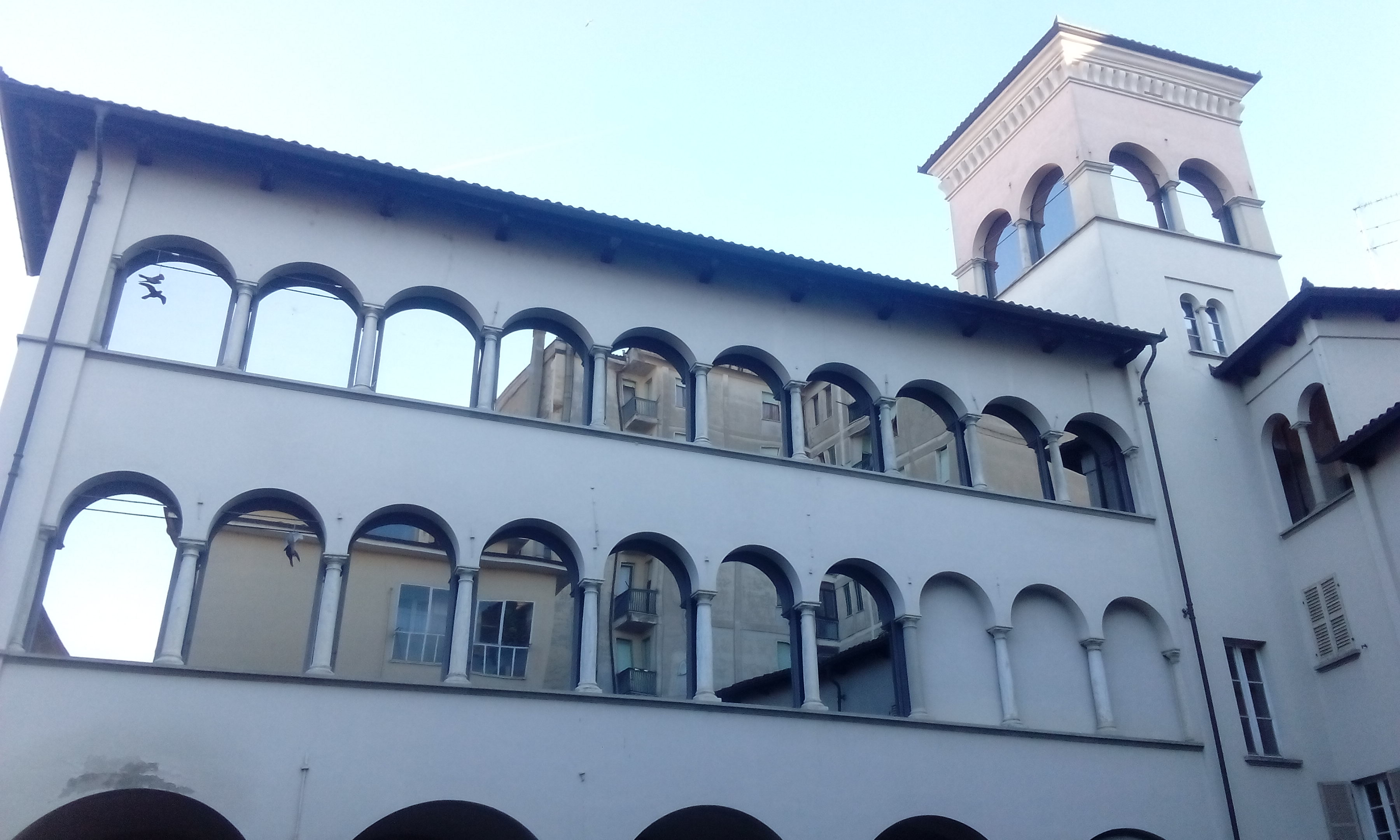 Il cortile del palazzo in Acqui Terme